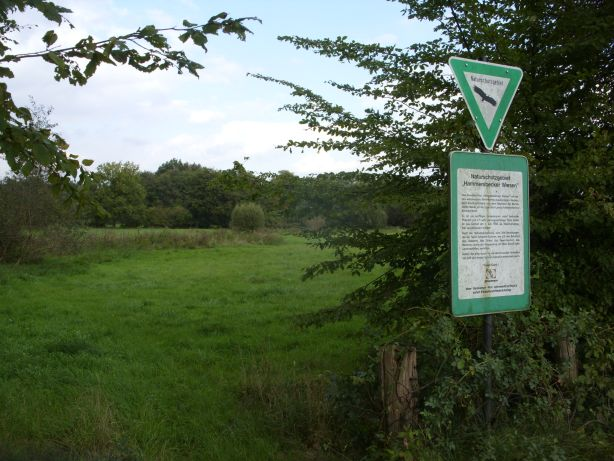 Hammersbecker Wiesen